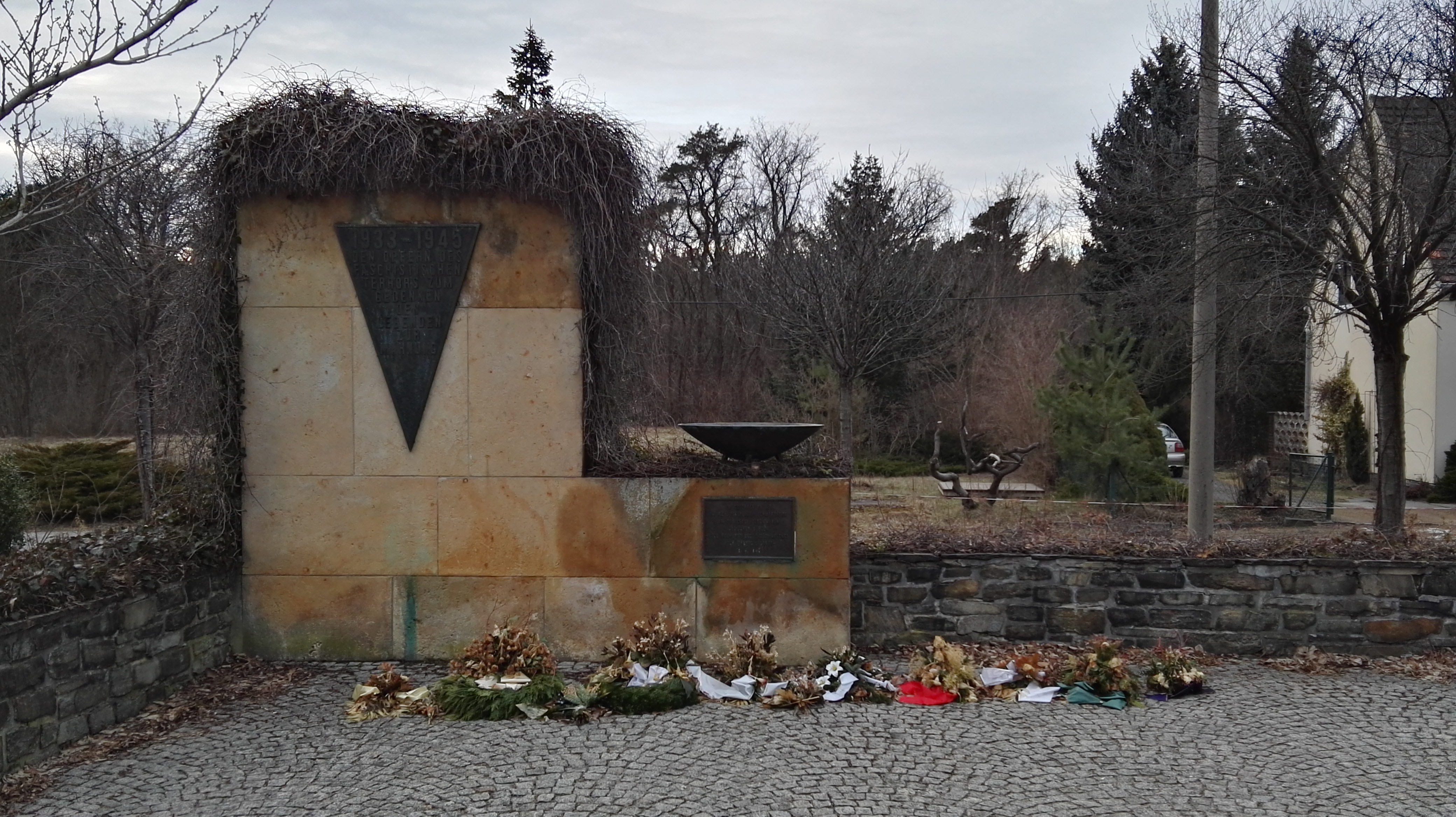 Gedenkstätte für das ehemalige KZ Außenlagers Schwarzheide